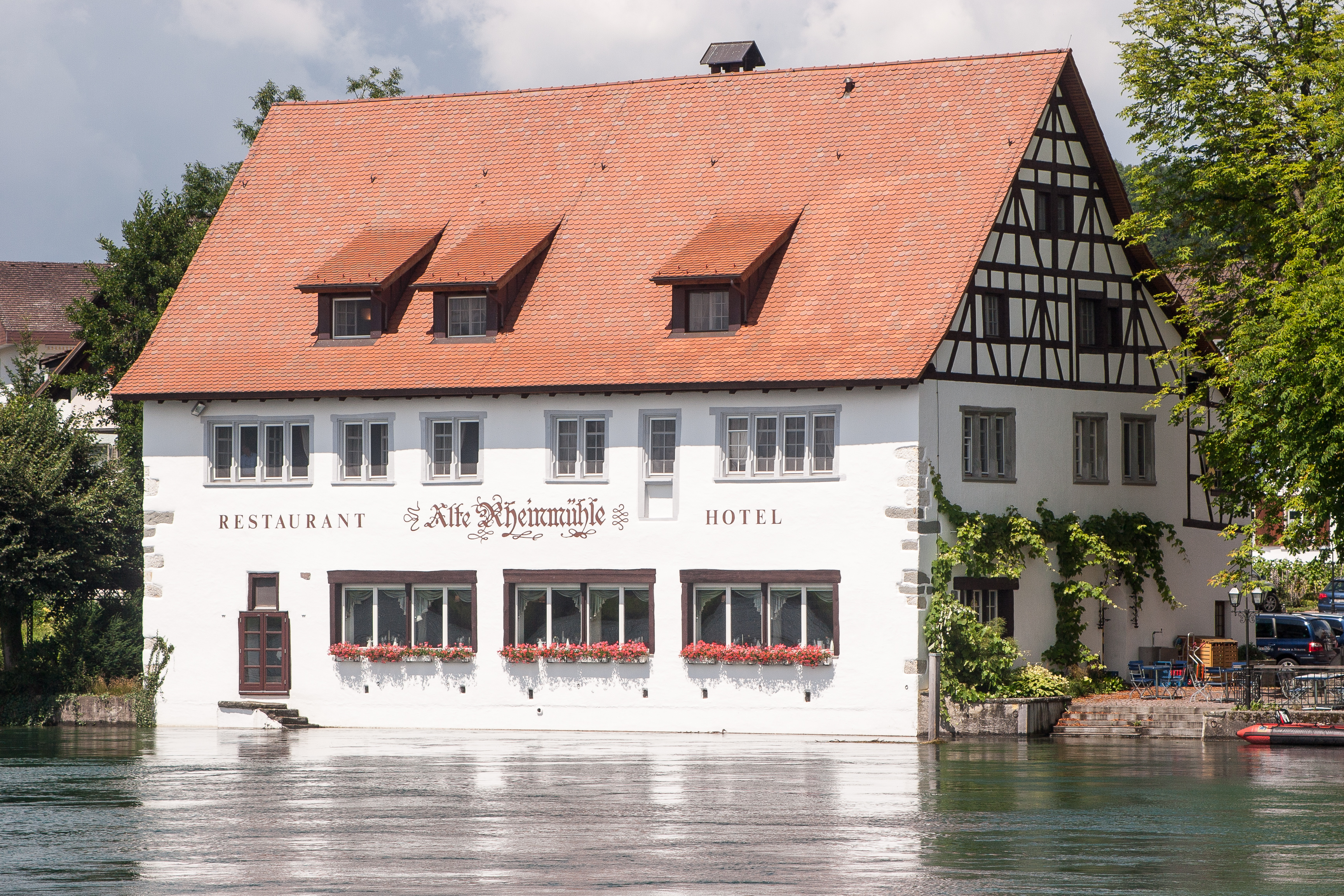 Alte Rheinmühle in Büsingen (in 2008)